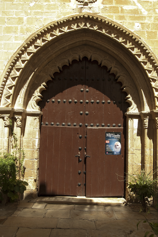 Portada interior (Mudejar) del Ral Convento de Santa Clara, en Úbeda (Jaén)